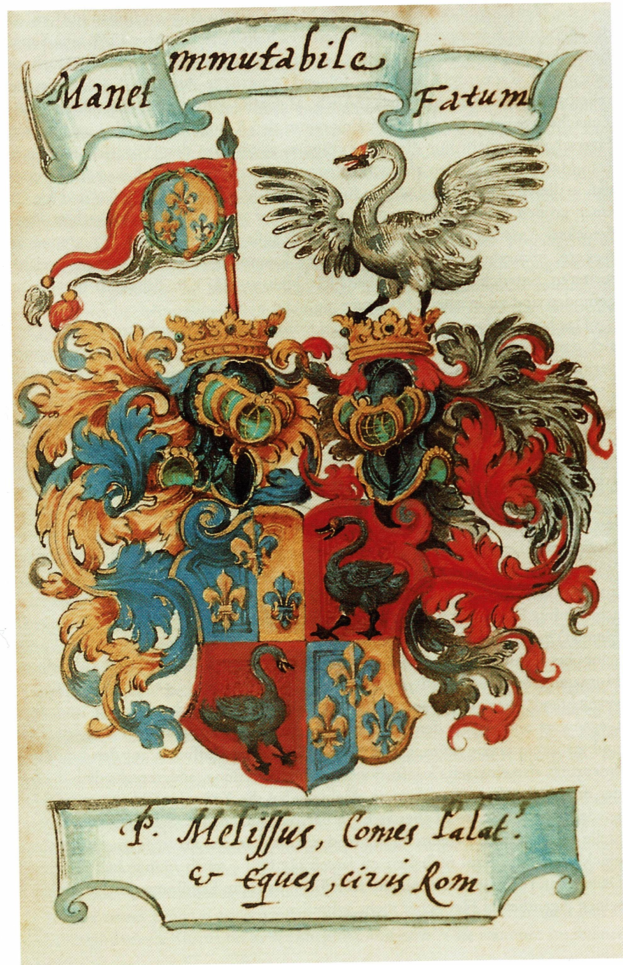 Wappen des Paul Melissus (eigtl. Schad) und eigenhändige Devise im Exemplar der Schediasmata (1574 und 1575), das er 1581 dem Nürnberger Arzt Gregor Palma widmete. Stadtbibliothek Nürnberg Phil. 2861.8° Wappen: Geviert. Feld 1 und 4: Gespalten von blau und silber drei Lilien (1:2) in verwechselten Farben. Feld 2 und 3: In Rot ein silberner Schwan. Motto: "Manet immutabile fatum".